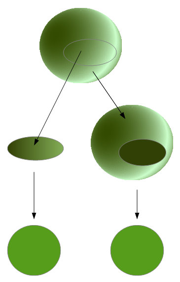 Illustration zum Satz von Mazur über Einbettungen